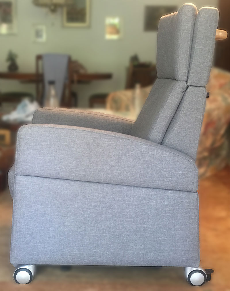 Pflegesessel / ReHa Sessel mit Rollen für Mobilität, Armlehnen gesteckt